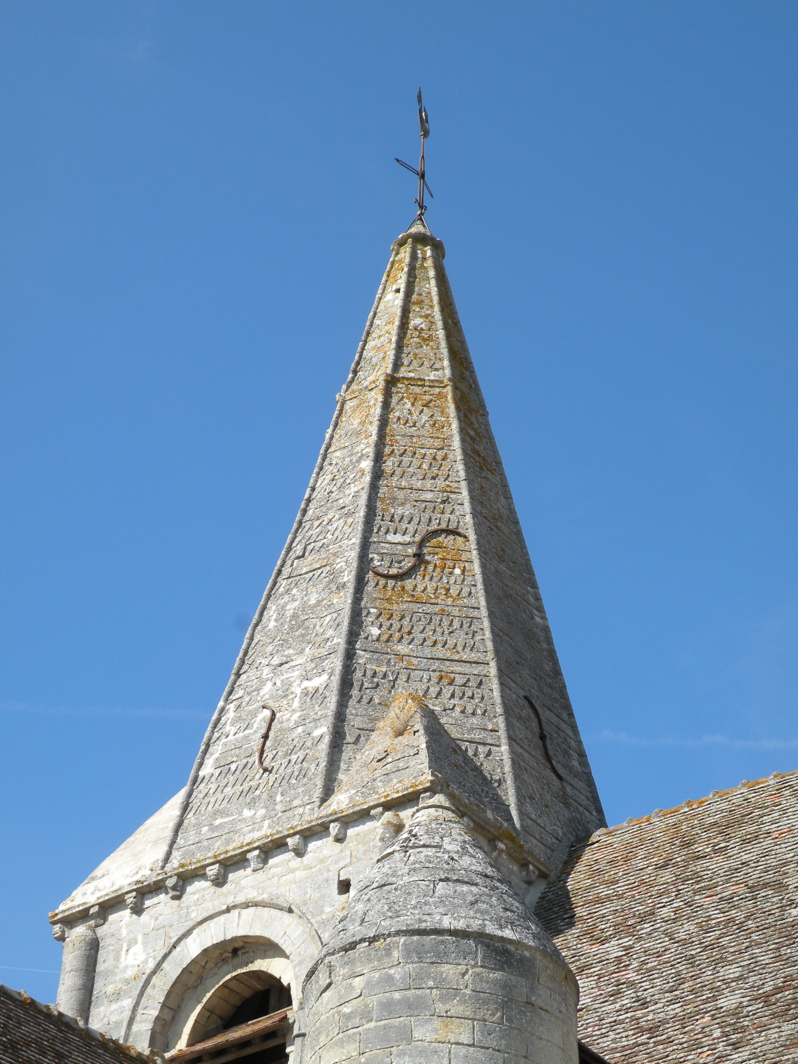 Église Saint-Gilles-Saint-Leu de Boubiers